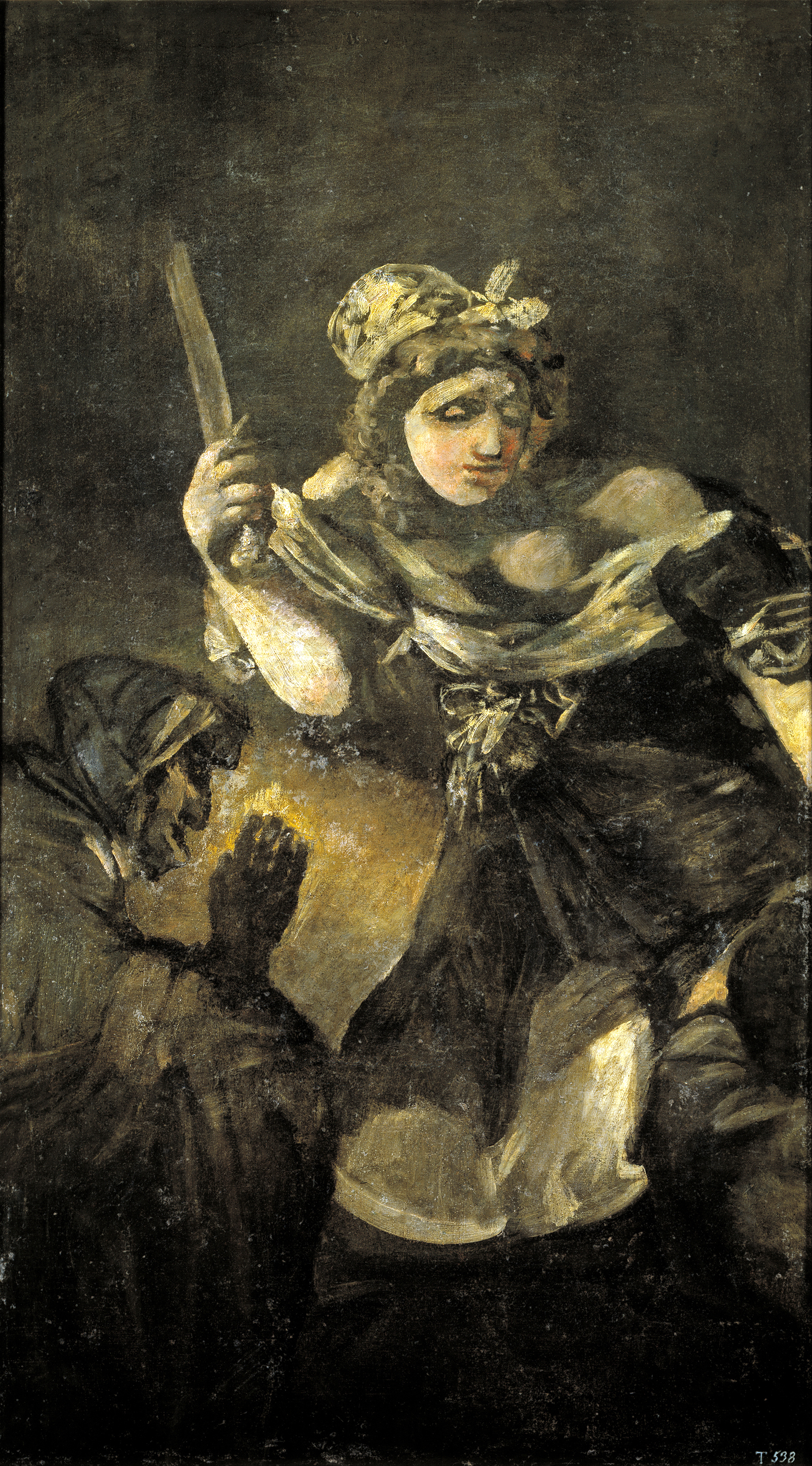 Francisco de Goya, Judit y Holofernes, 1819-1823, técnica mixta sobre revestimiento mural, 146 x 84 cm. Museo del Prado (Madrid, España)